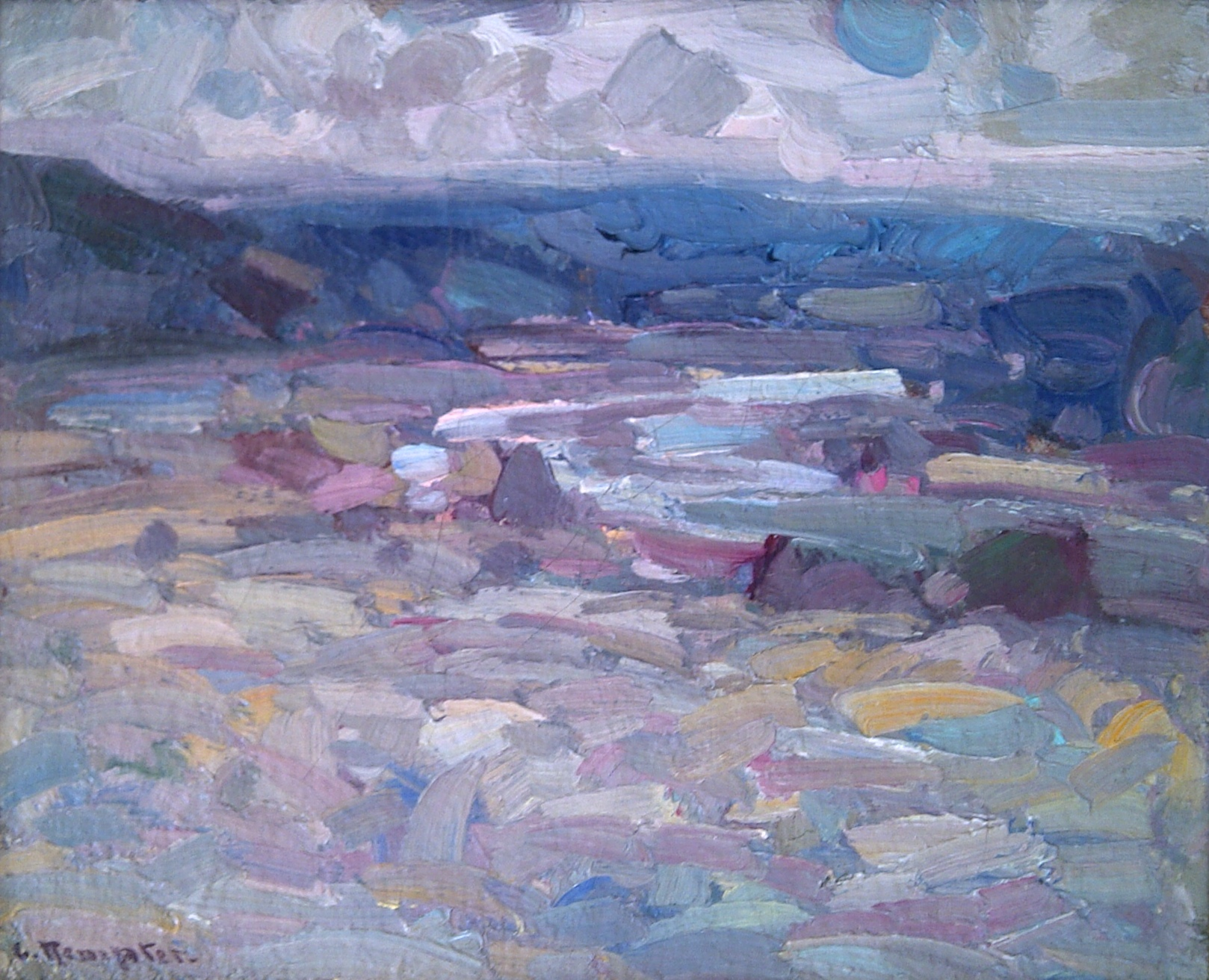 Bild einer Landschaft von Caroline Kempter